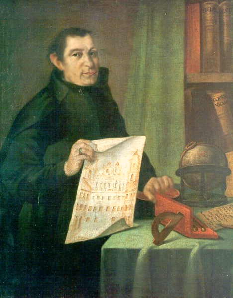 Portrait of Tomasz Żebrowski